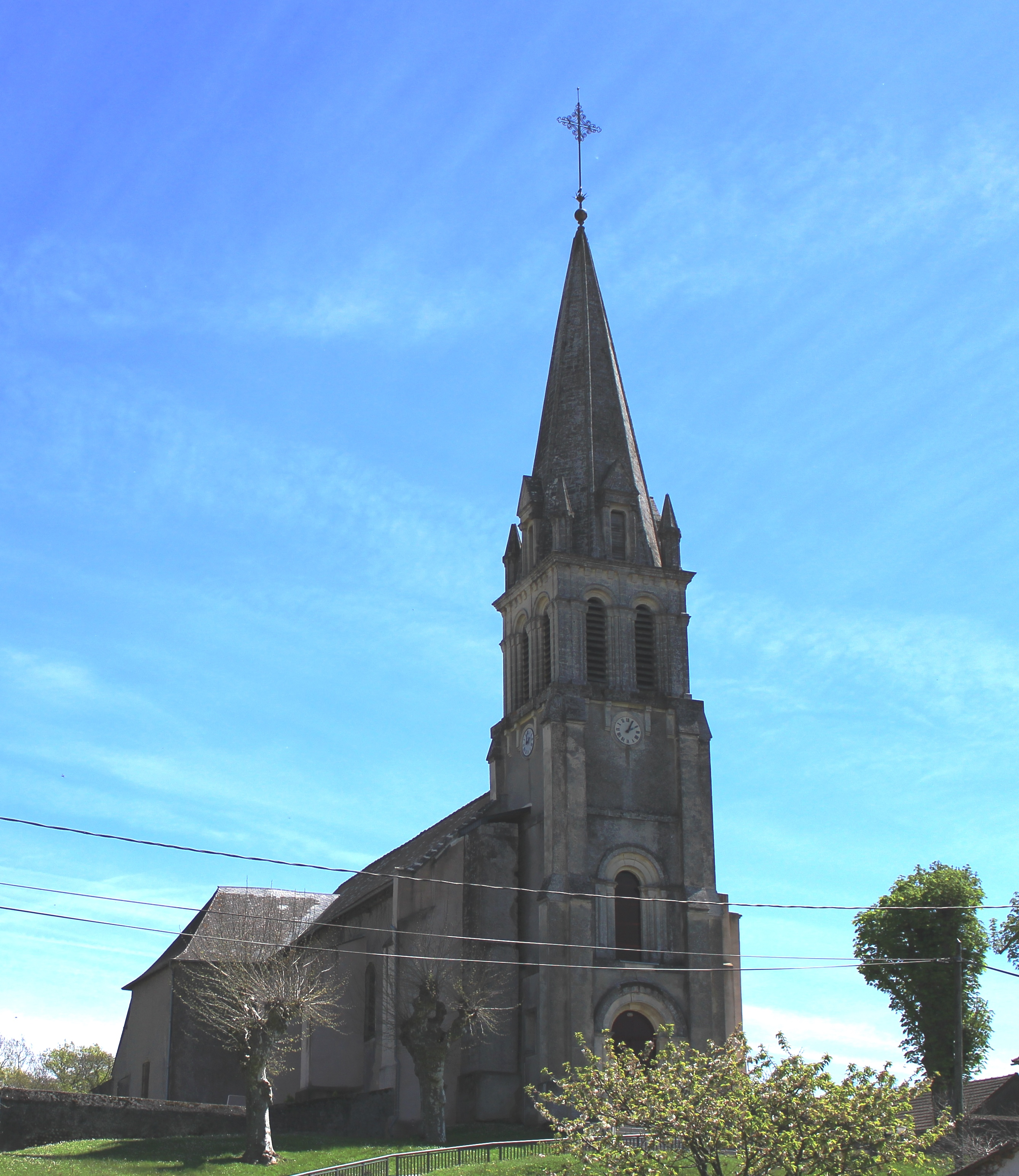 Église Saint-Christophe d'Orleix (Hautes-Pyrénées)